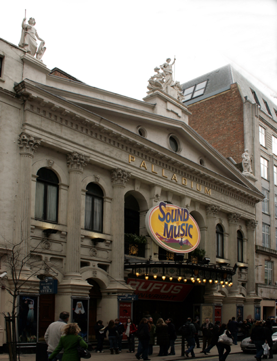 London Palladium.